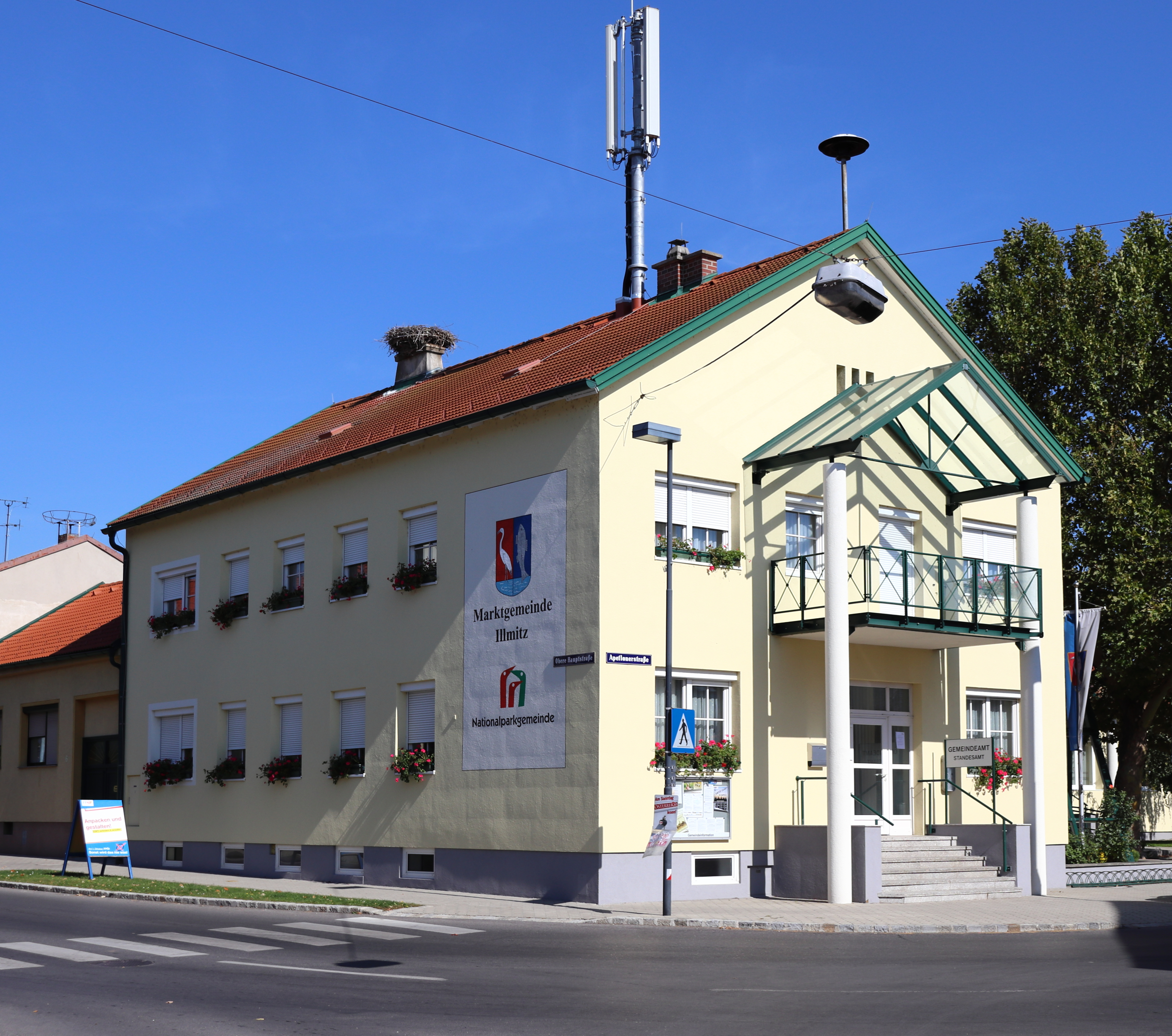 Gemeindeamt der Marktgemeinde Illmitz